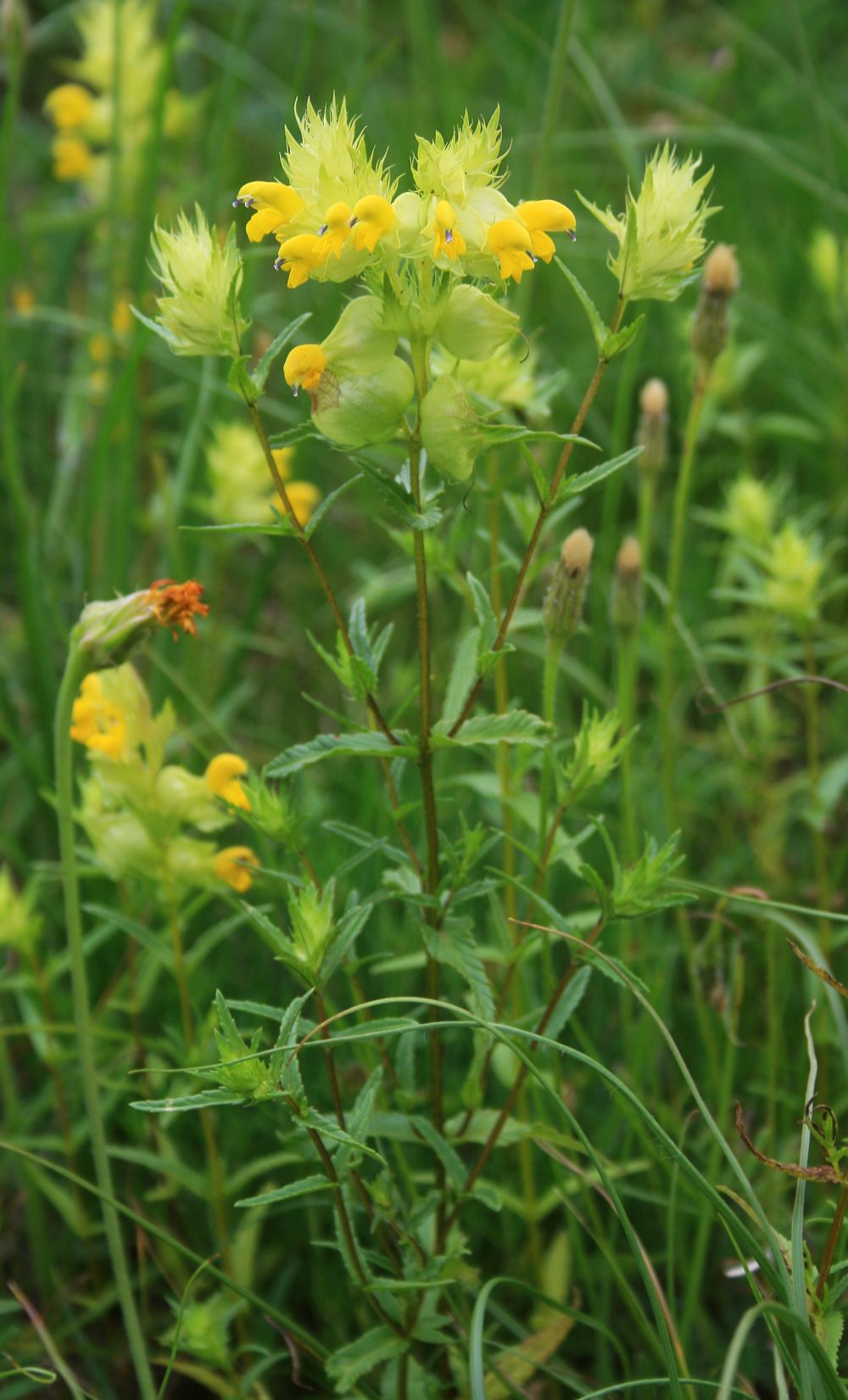 Grannen-Klappertopf (Rhinanthus glacialis s.lat.), Sommerwurzgewächse (Orobanchaceae) - Slowenien/Slovenija/Slovenia: Primorska, N Podgorje